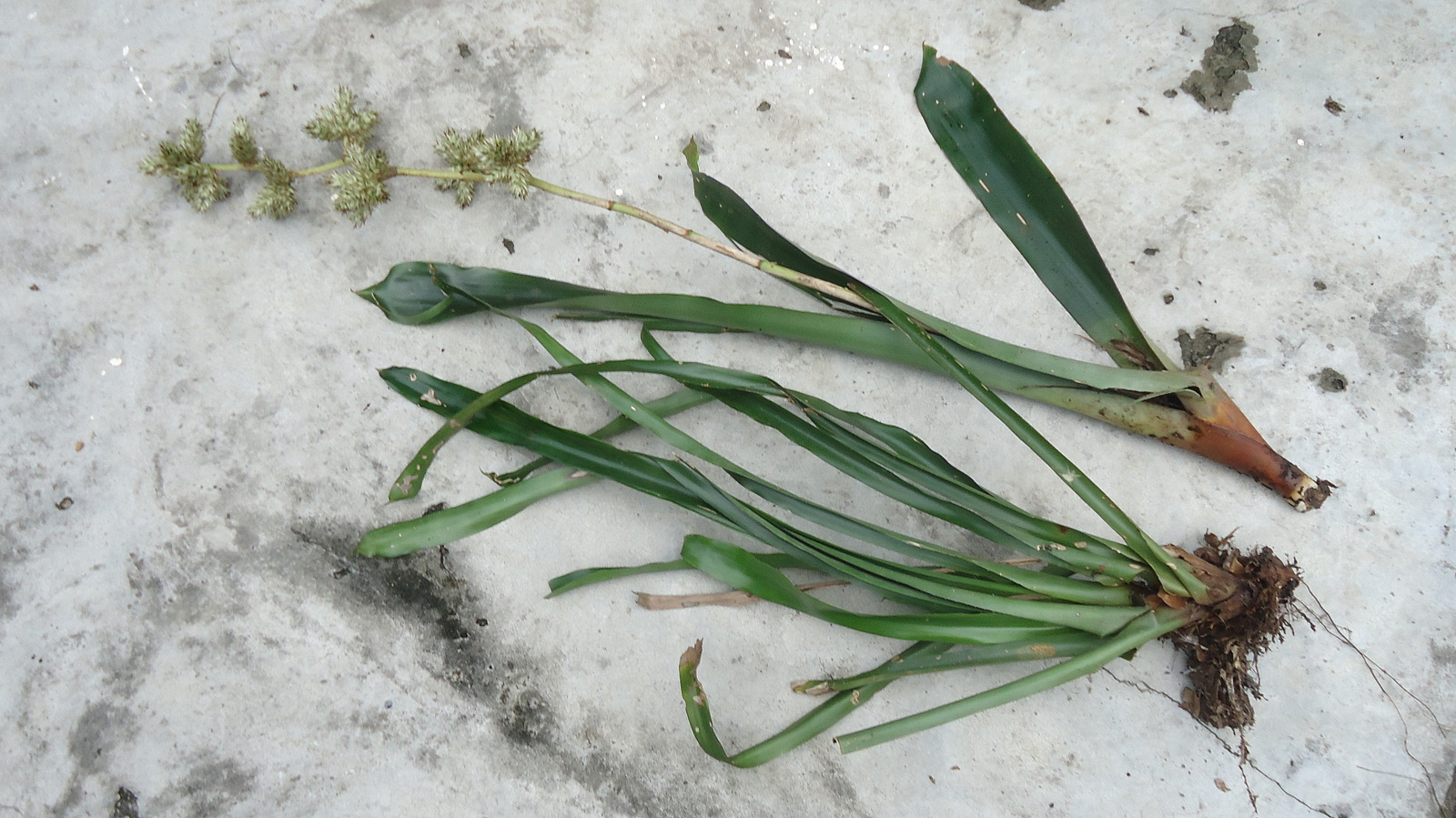 Hohenbergia stellata Schult. & Schult. f.